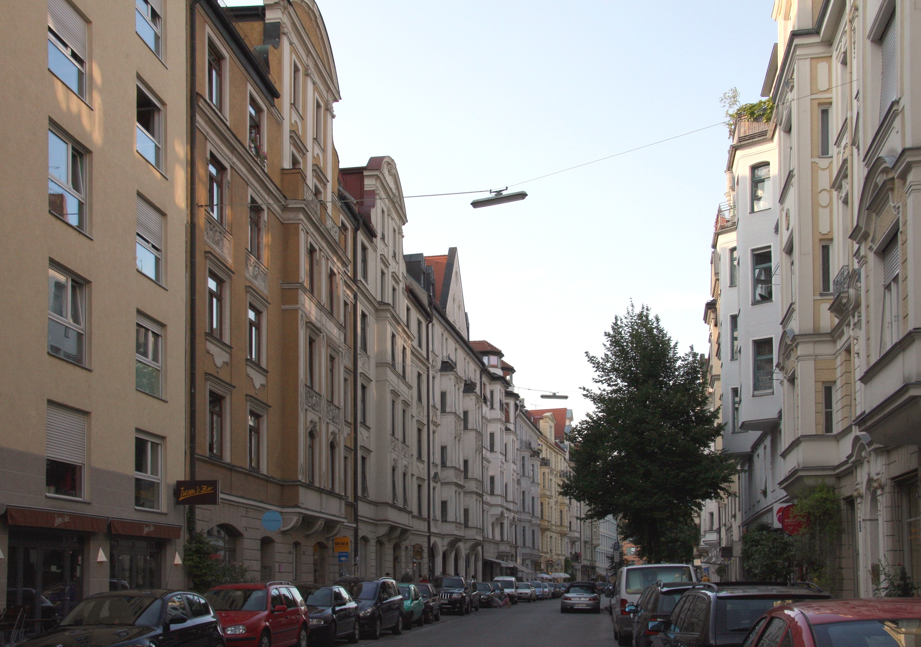 Muenchen: Hans-Sachsstraße im Glockenbachviertel